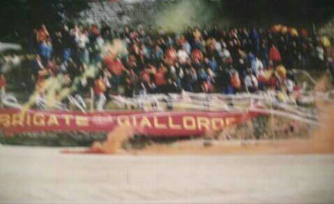 Anno 1990. La curva dello stadio Signora Chiara, in serie D, gremita di tifosi.